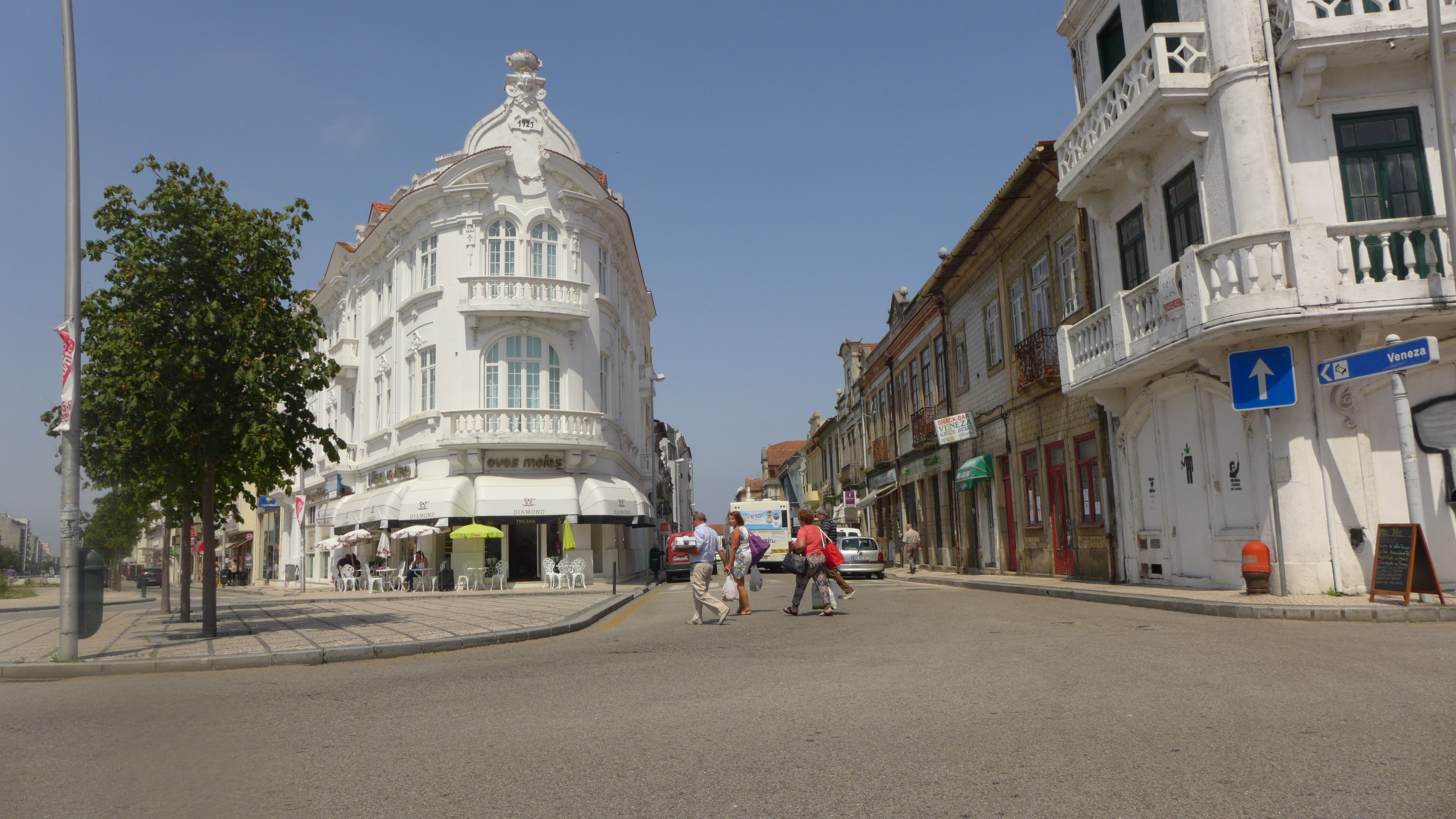 Aveiro